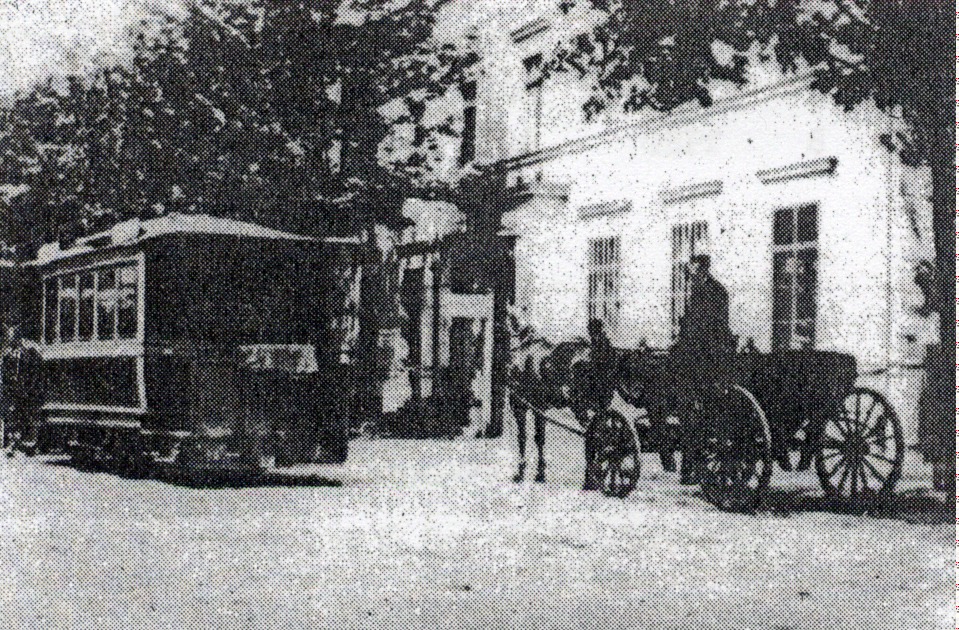 Wagen 4 der Cöpenicker Pferde-Eisenbahn am Bahnhof Cöpenick